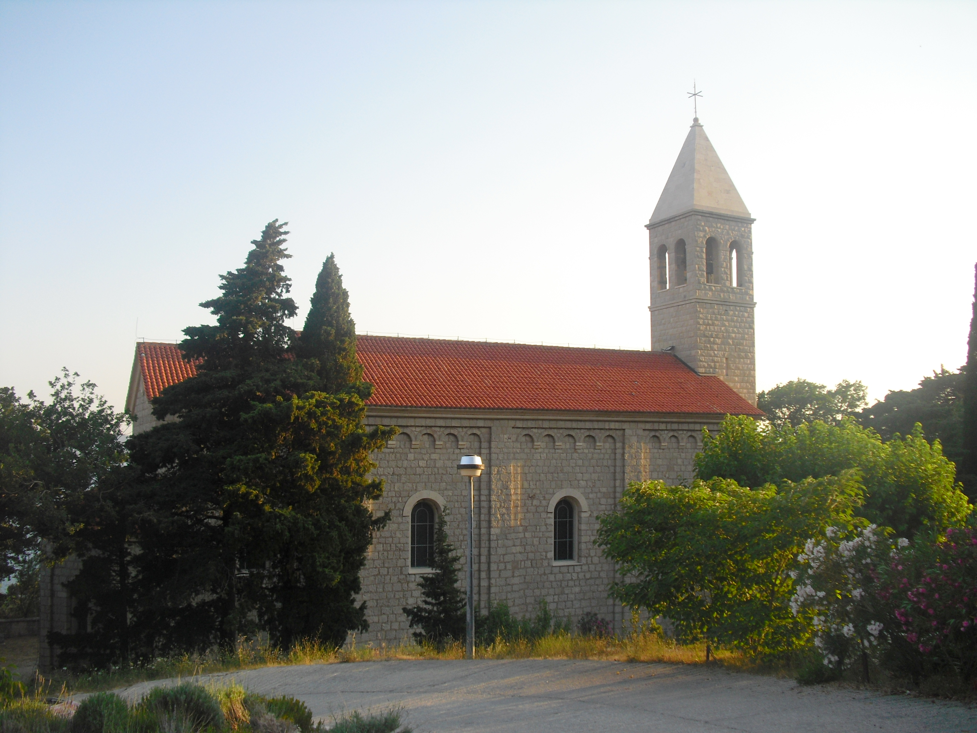 Obec Brela, časť Zeliti.Dalmácia, miestny kostol